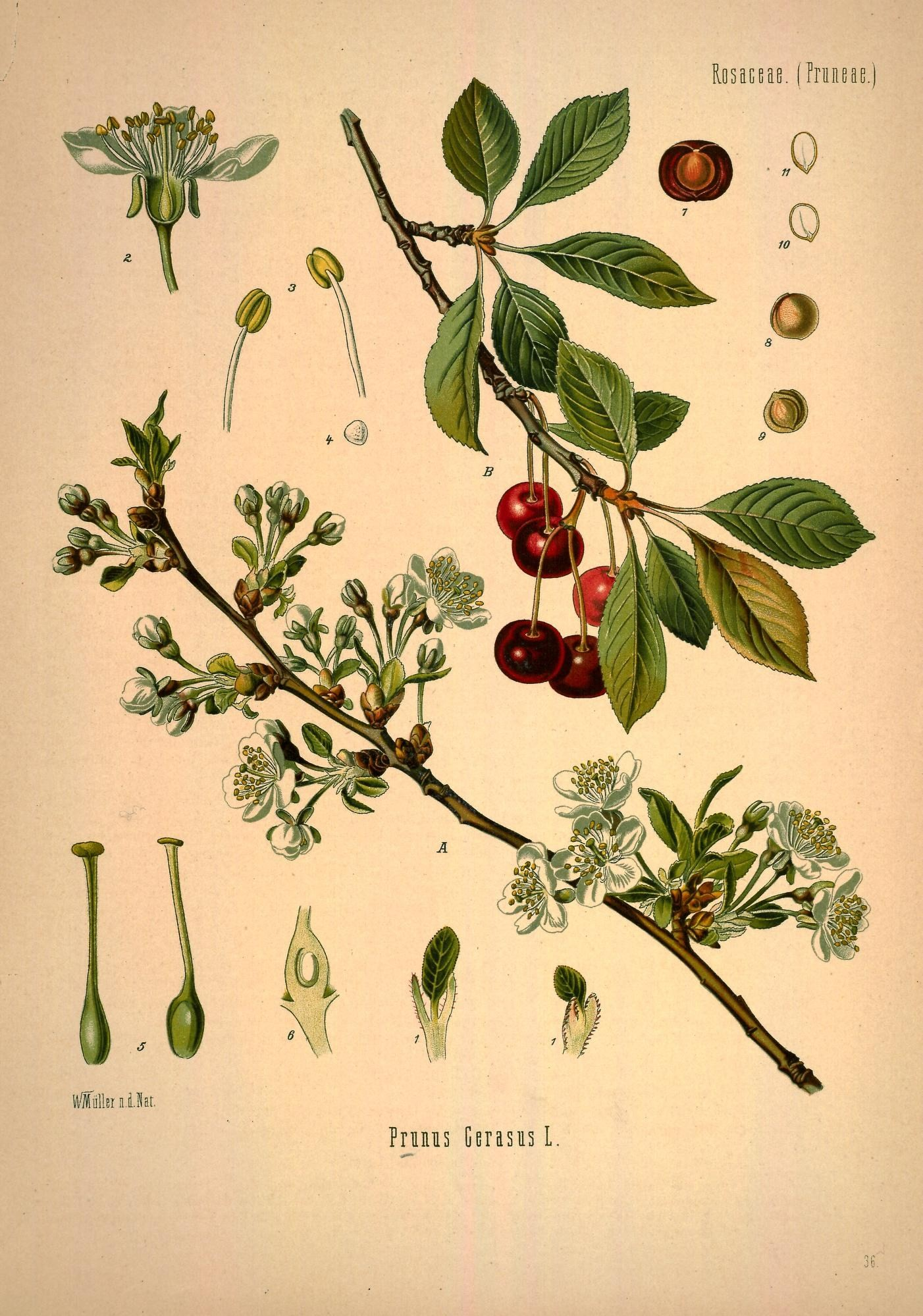 Sauerkirsche. A blühender und B fruchtender Zweig in natürl. Grösse; 1 junge Blätter mit den beiden Nebenblättern, desgl.; 2 Blüthe im Längsschnitt, vergrössert; 3 Staubgefässe, desgl.; 4 Pollen, desgl.; 5 Stempel, desgl.; 6 Fruchtknoten im Grunde des Unterkelches, desgl.; 7 Frucht, zerschnitten, natürl. Grösse; 8 Fruchtkern mit Steinschale, desgl.; 9 derselbe zerschnitten, desgl.; 10 u. 11 Same nach Entfernung der Steinschale, desgl.